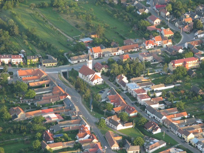 Dominanta obce Zlechov - kostel sv. Anny, letecký pohled